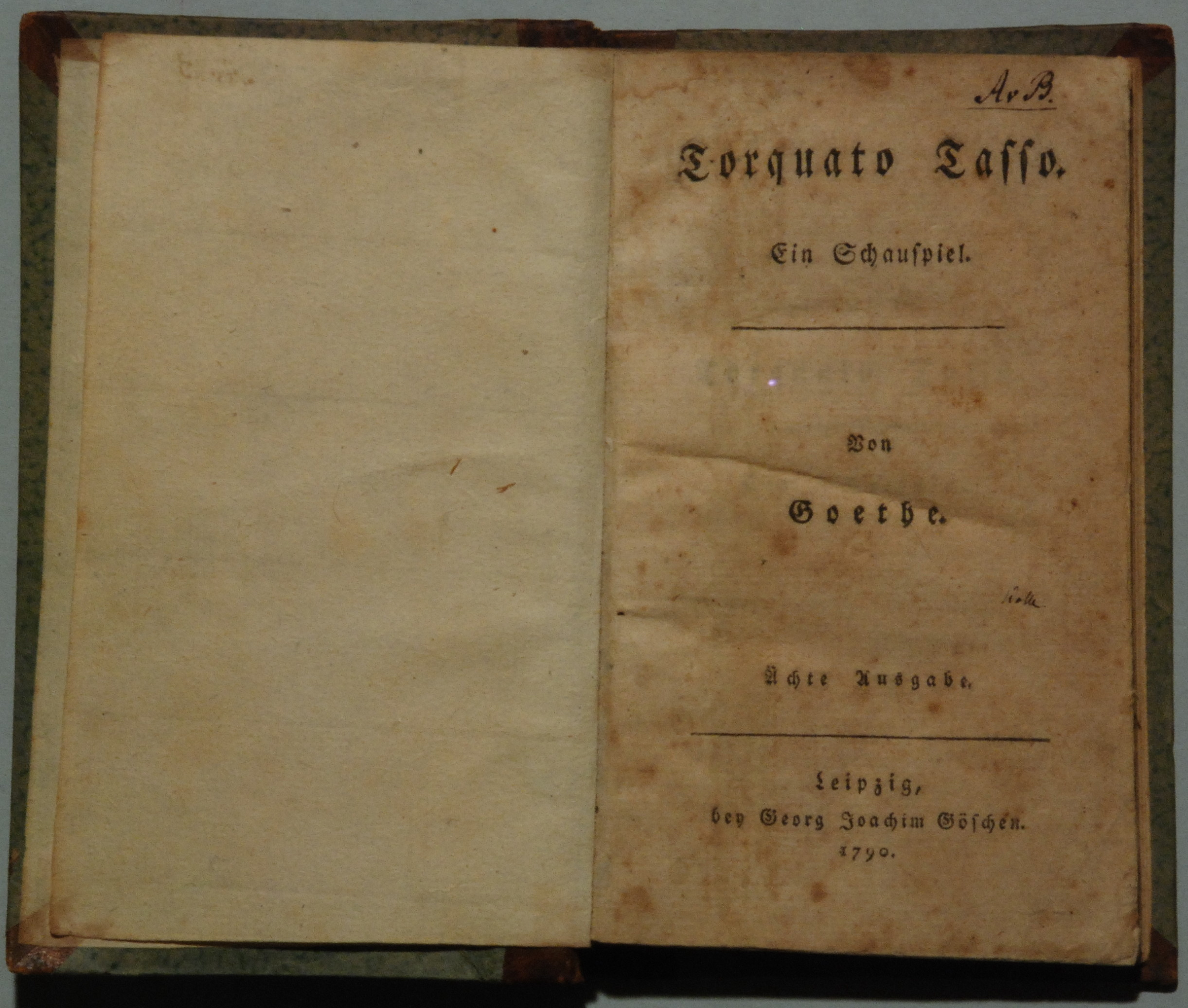 Erstdruck Für das Lichtbild